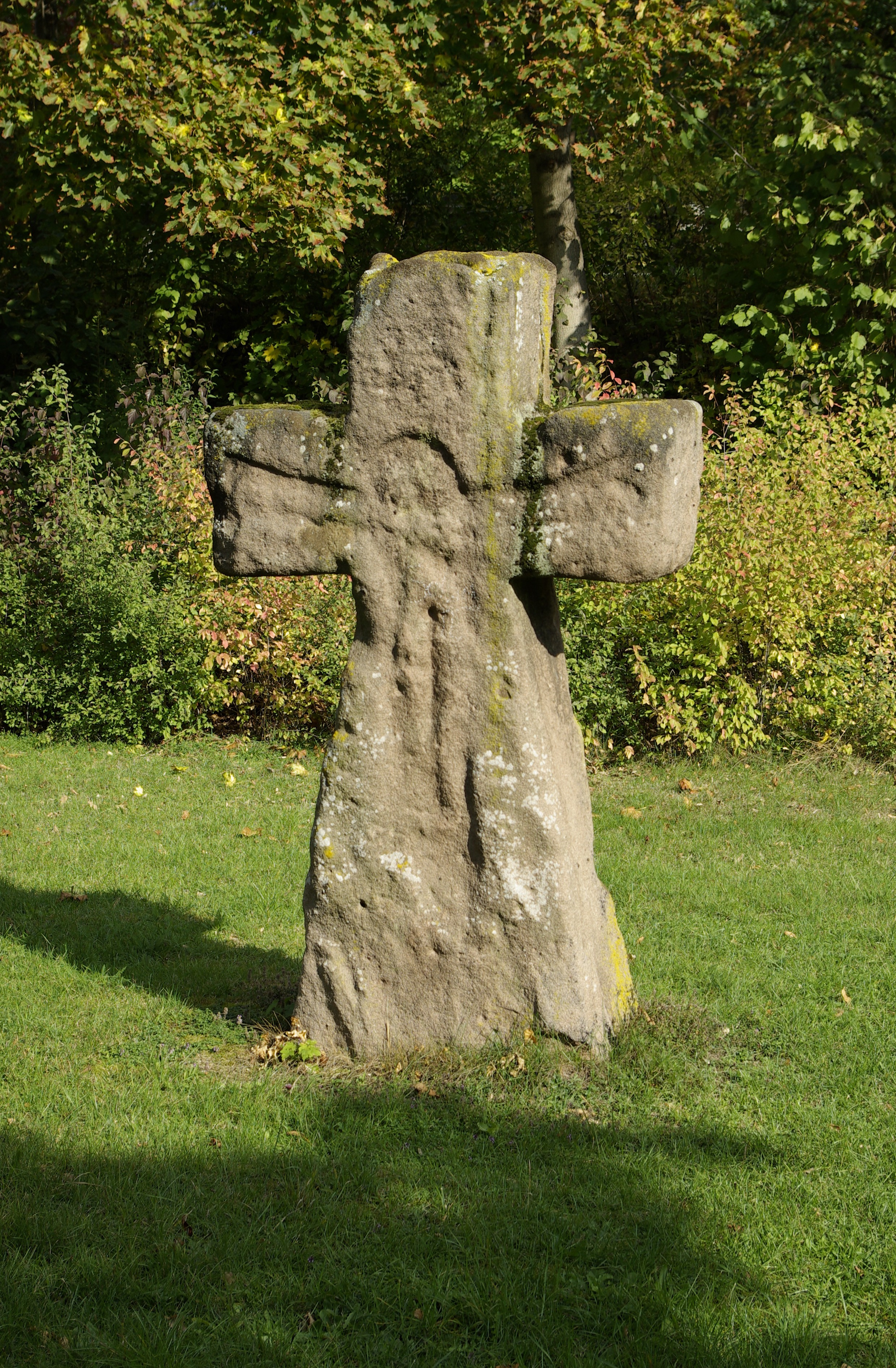 Der mittelalterliche Kreuzstein im Erlanger Stadtteil Eltersdorf